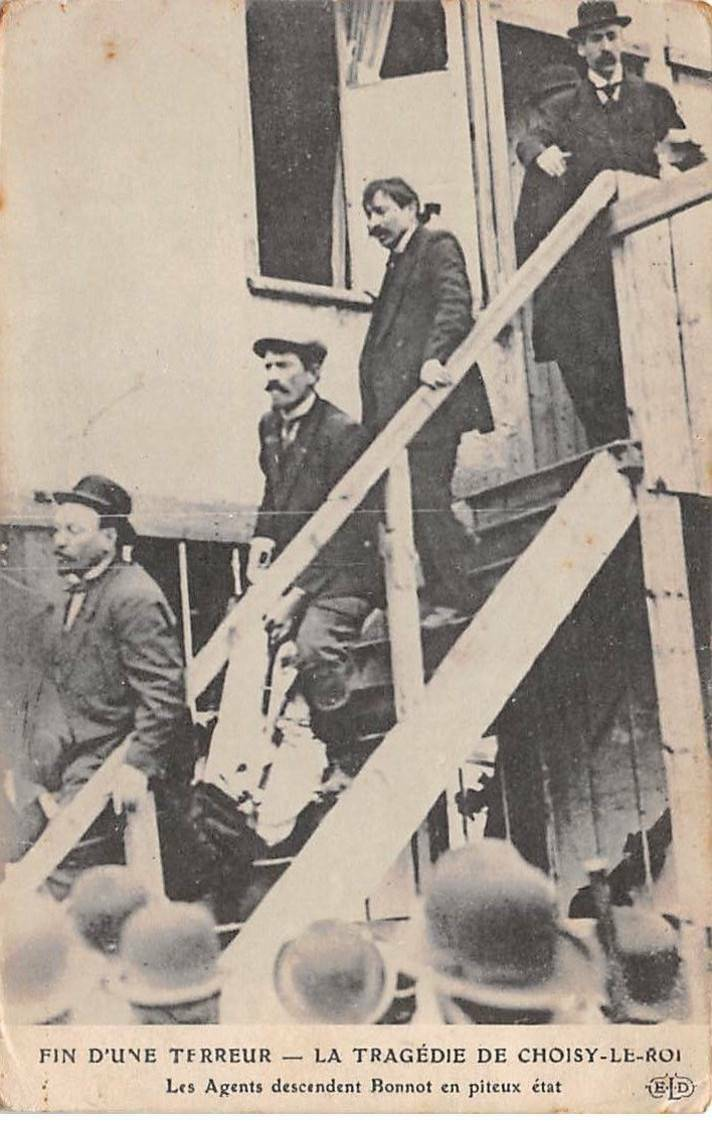 foto de jornal sobre o cerco ao anarquista Jules Bonnot